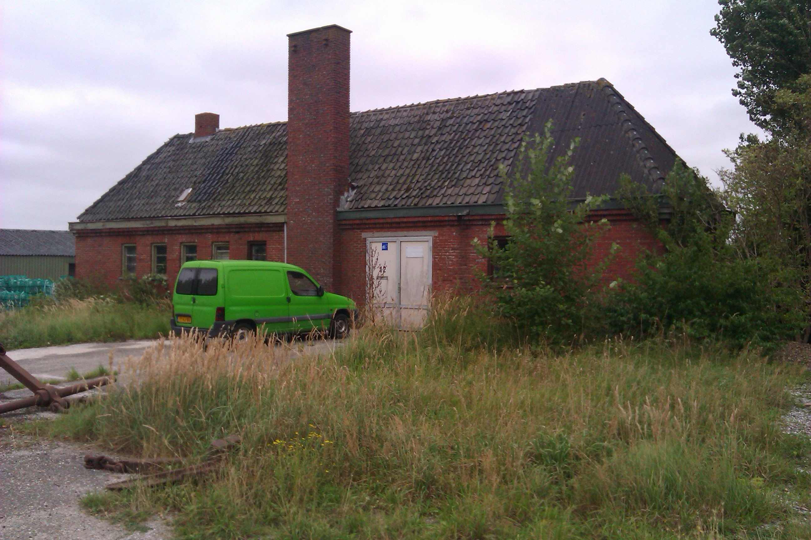 Bijgebouwtje op het emplacement van het voormalige station van Zoutkamp